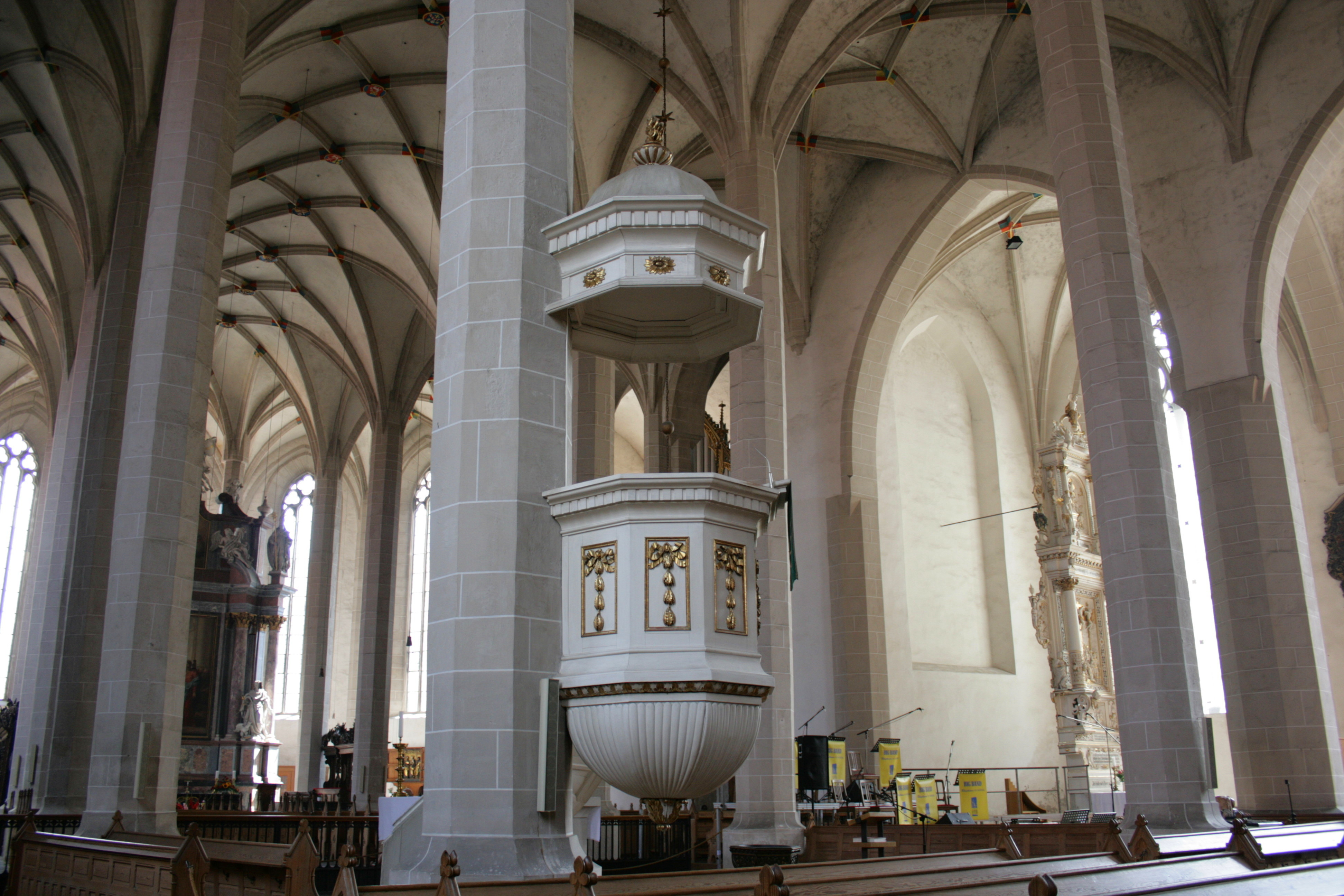 Dom St. Petri in Bautzen, evangelischer Teil Hornjoserbsce: Tachantska cyrkej swj. Pětra w Budyšinje; ewangelski dźěl.